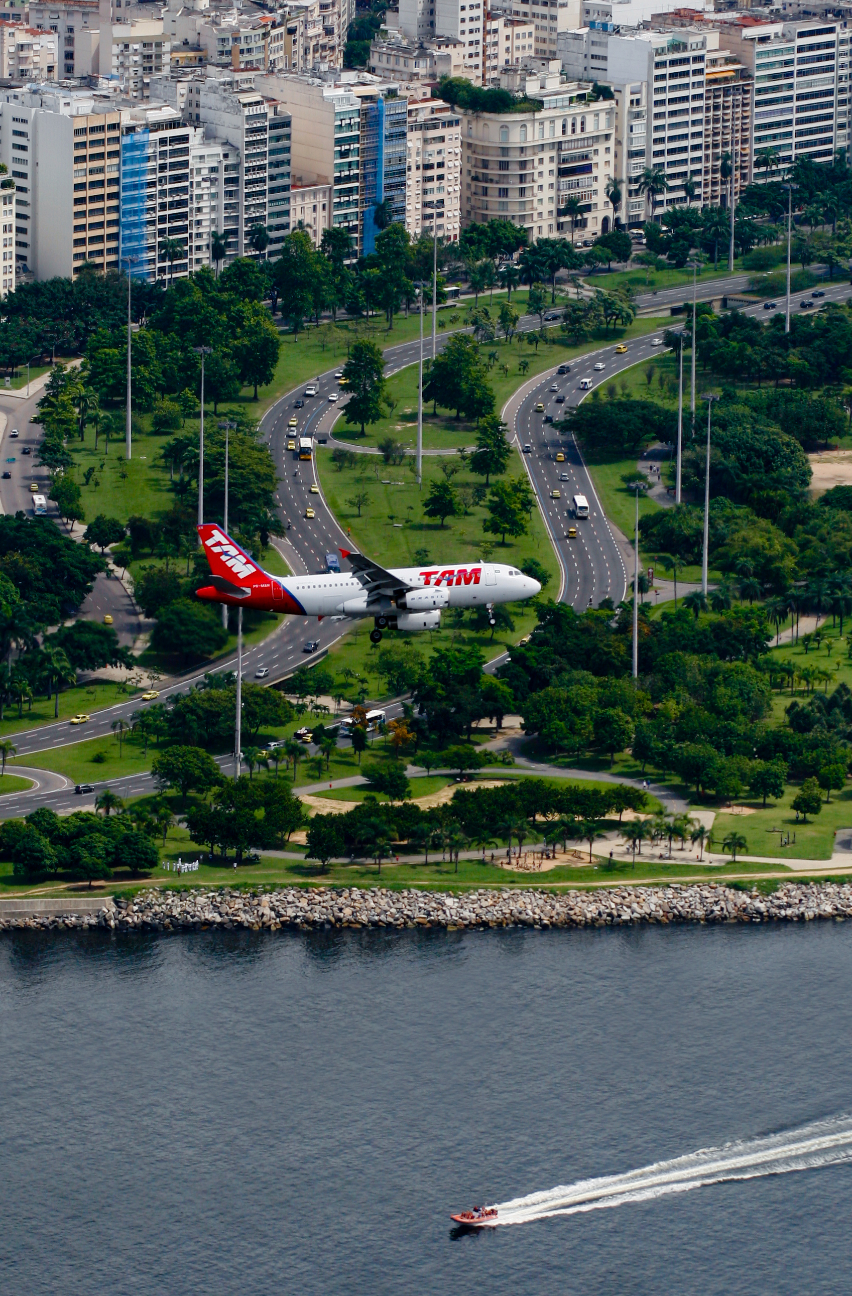 Aterro do Flamengo - RJ